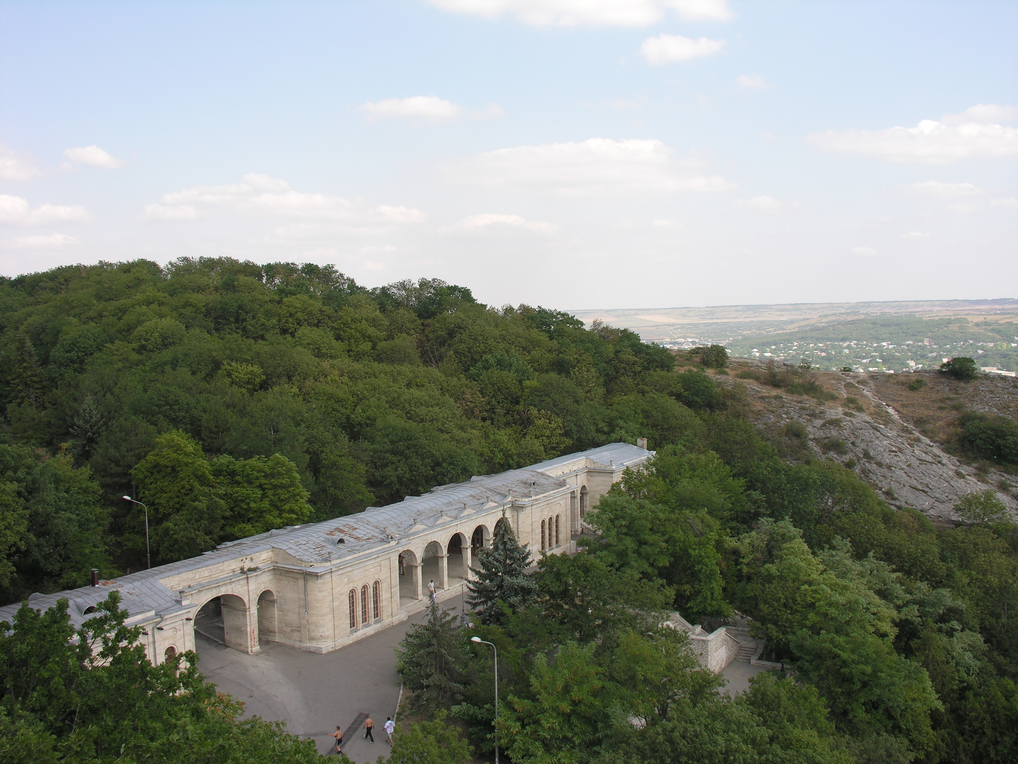 Академическая (Елизаветинская) галерея в Пятигорске